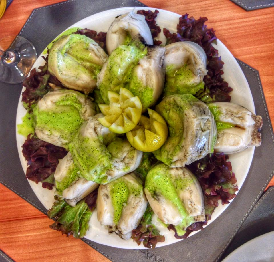 Locos de Puerto Montt. Chile